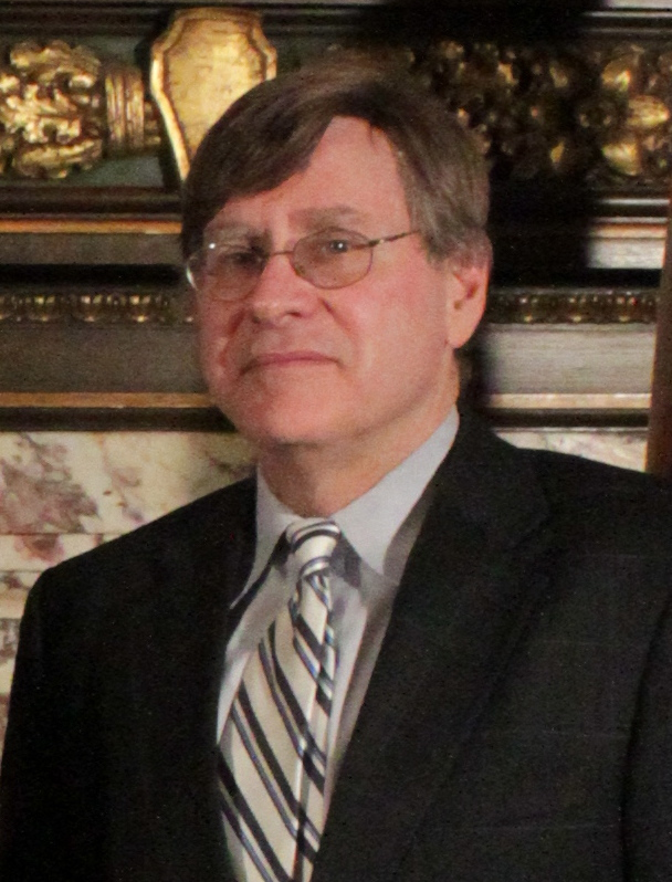 Minnesota State Senator Dick Cohen.